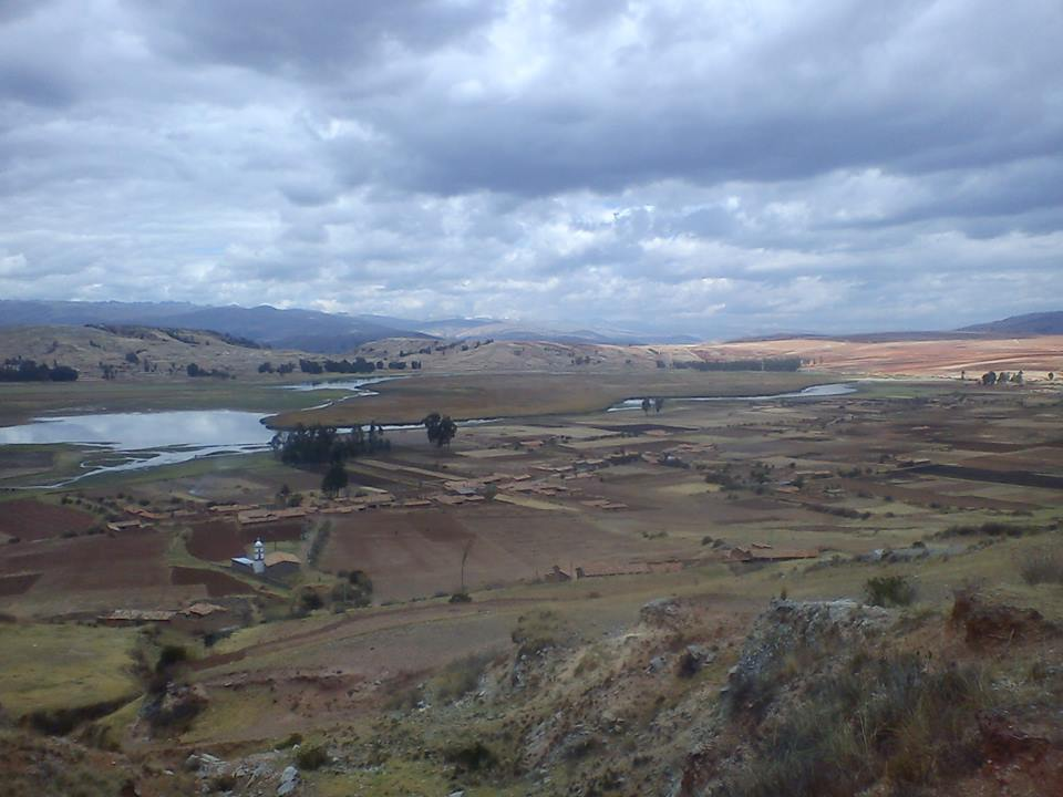 ES EL LAGO DEL ANEXO DE TRAGADERO, DISTRITO DE MARCO PROV. JAUJA.